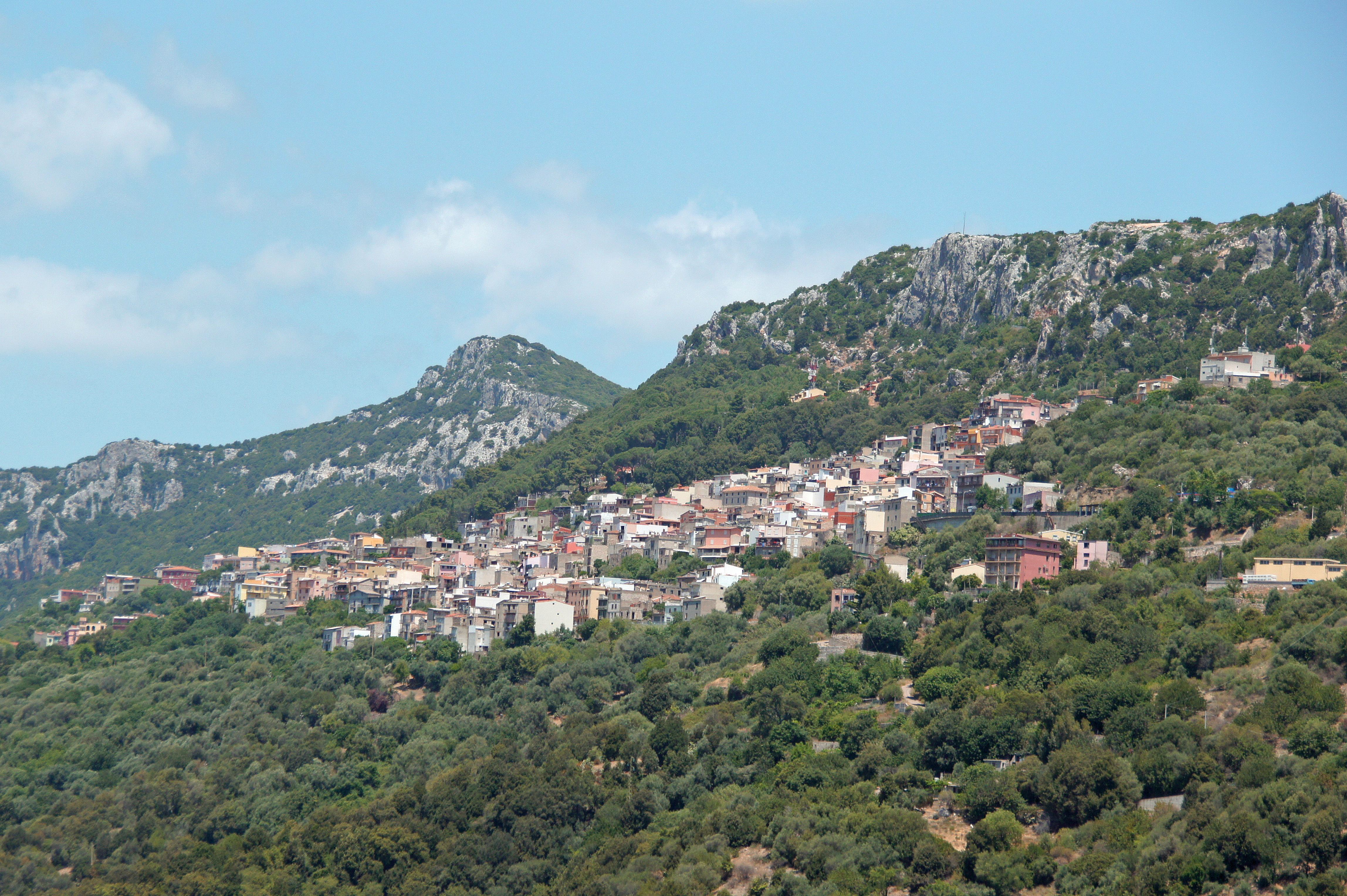 Baunei, Sardegna von der Strasse gesehen